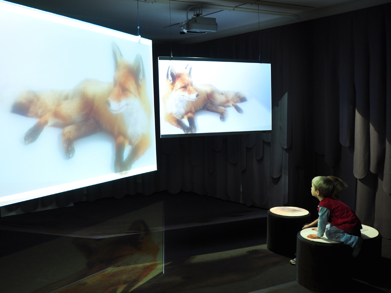 Dauerausstellung Tiere Film Naturmuseum ThurgauCC-by-sa 3.0/de